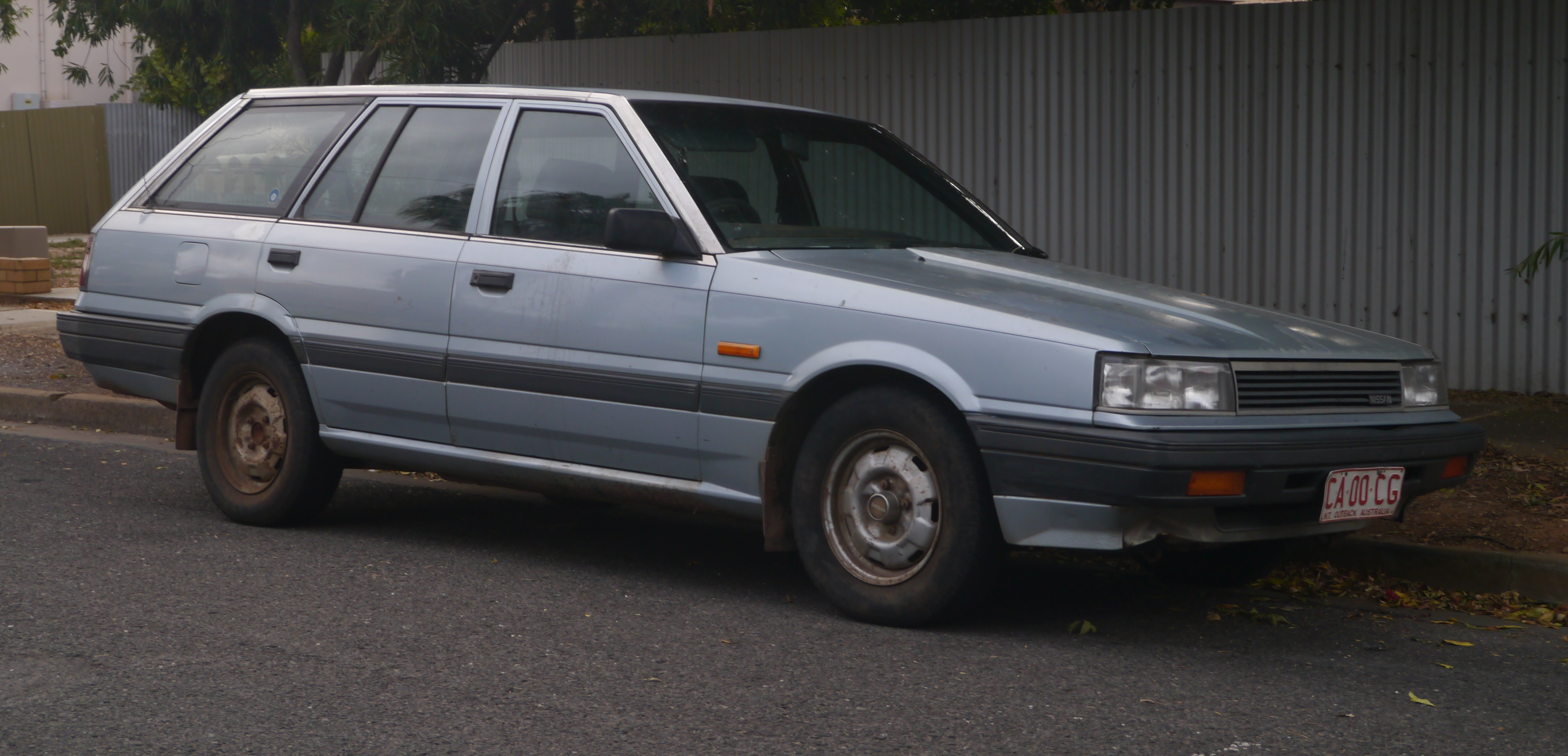 Australian built 1989 Nissan Pintara wagon.